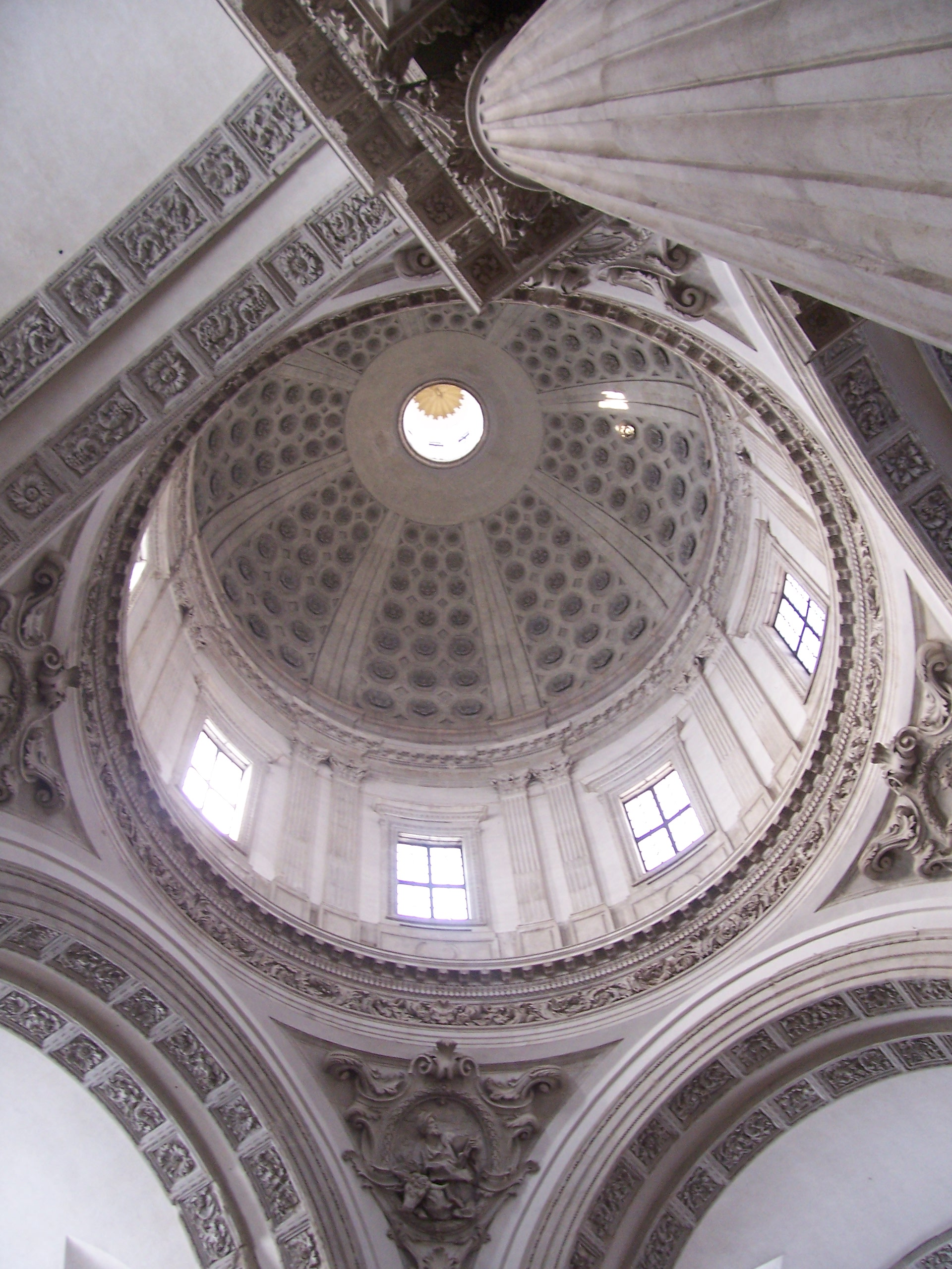 duomo nuovo brescia cupola3.jpg